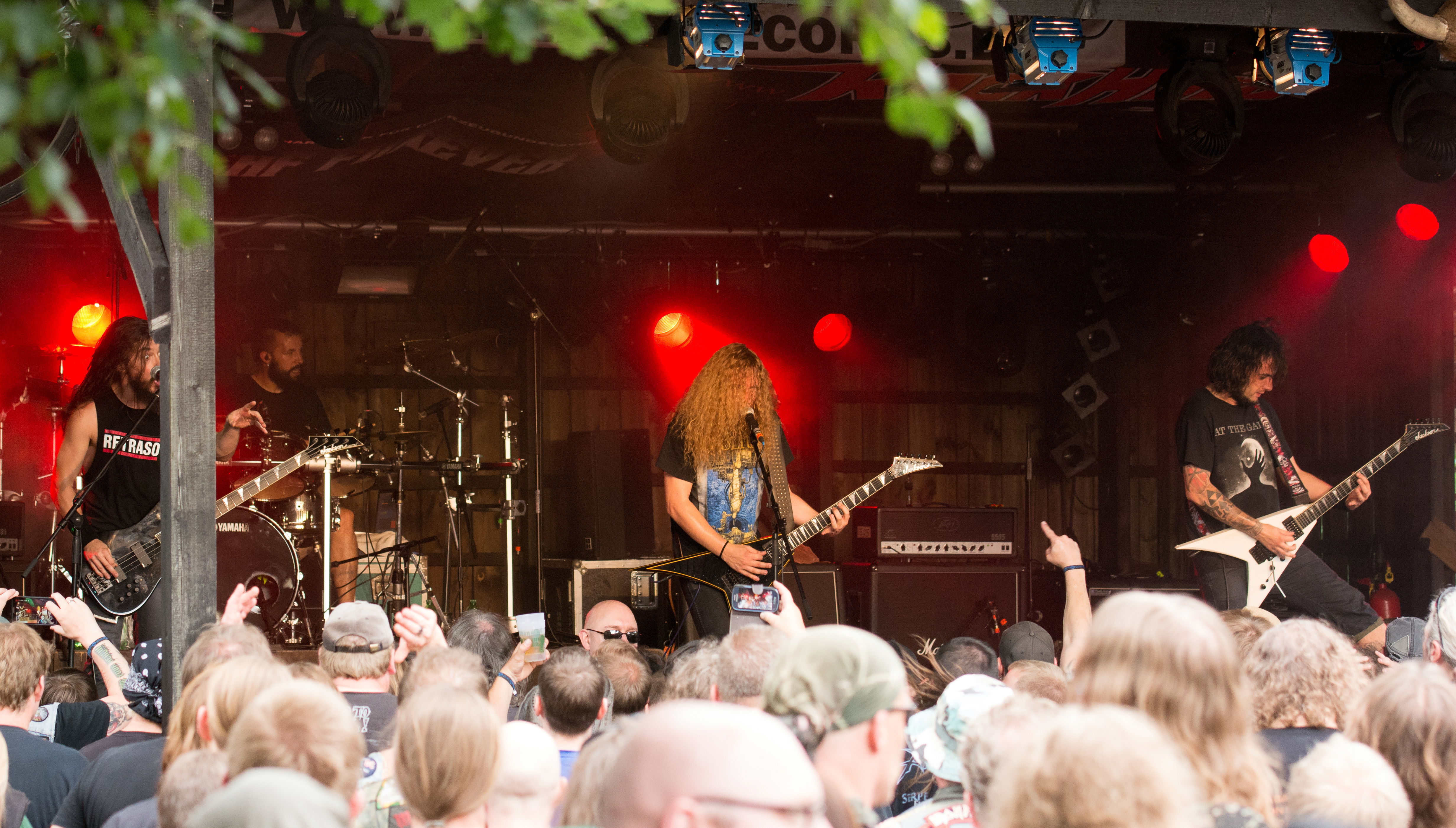 Angel Witch beim Headbangers Open Air 2016